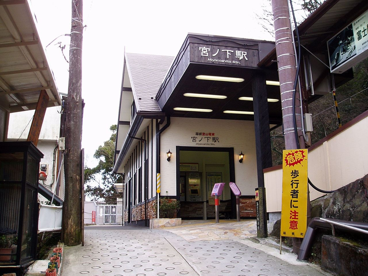 Miyanoshita Station, on the Hakone Tozan Line, Hakone, Kanagawa 宮ノ下駅